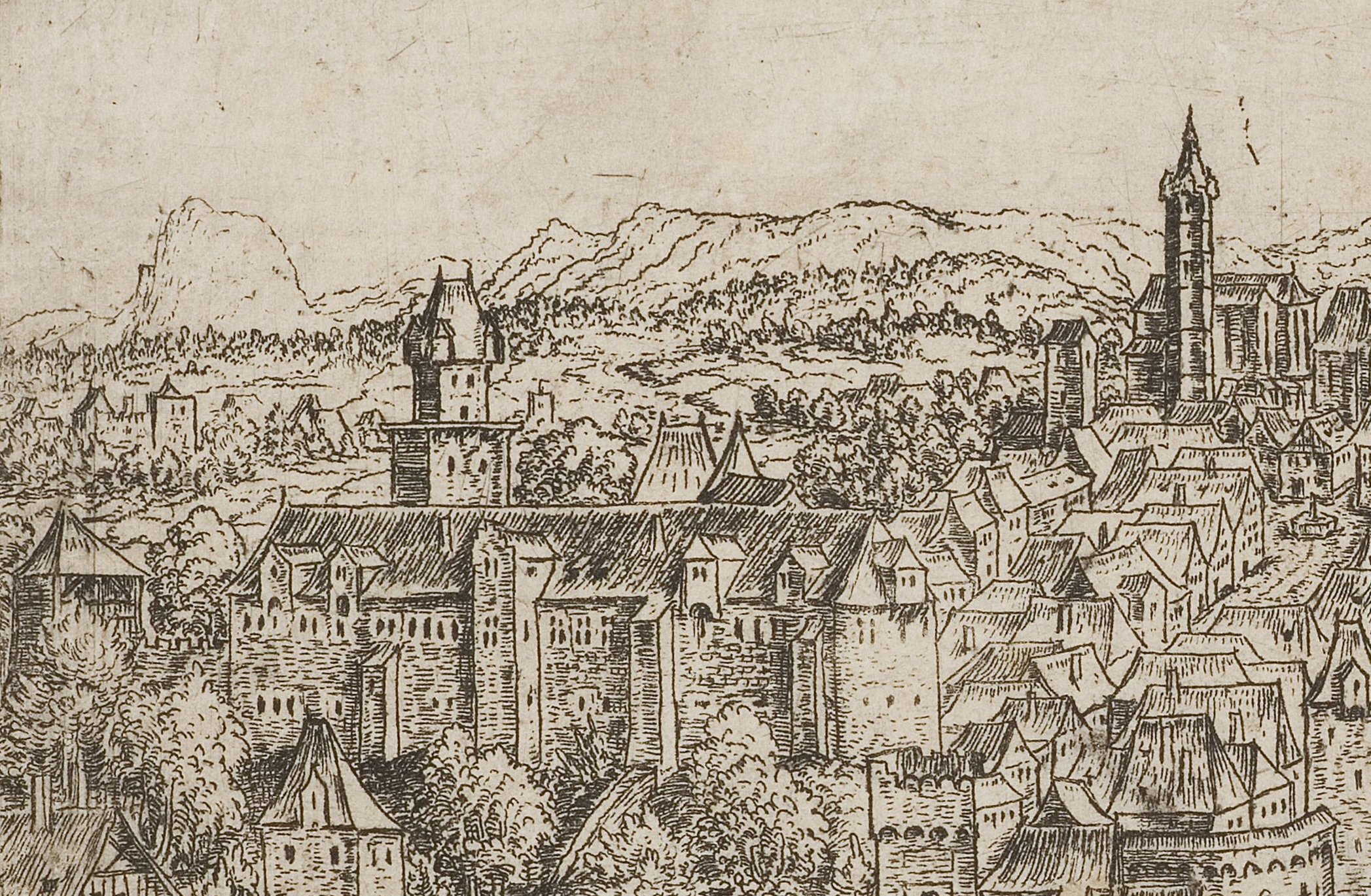 Ansicht der Styrapurch (Steyrburg) aus dem Jahr 1554 (Radierung)